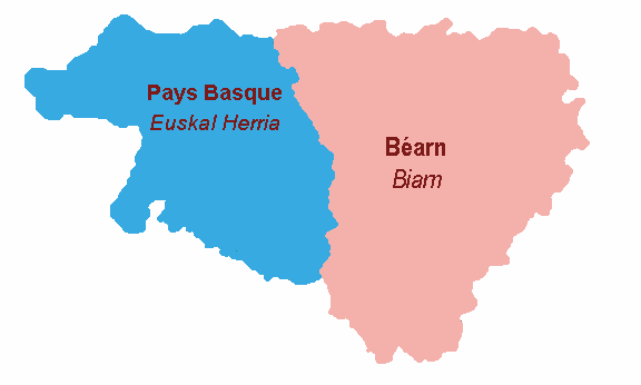 División del Departamento de Pirineos Atlánticos: País Vasco y Bearn